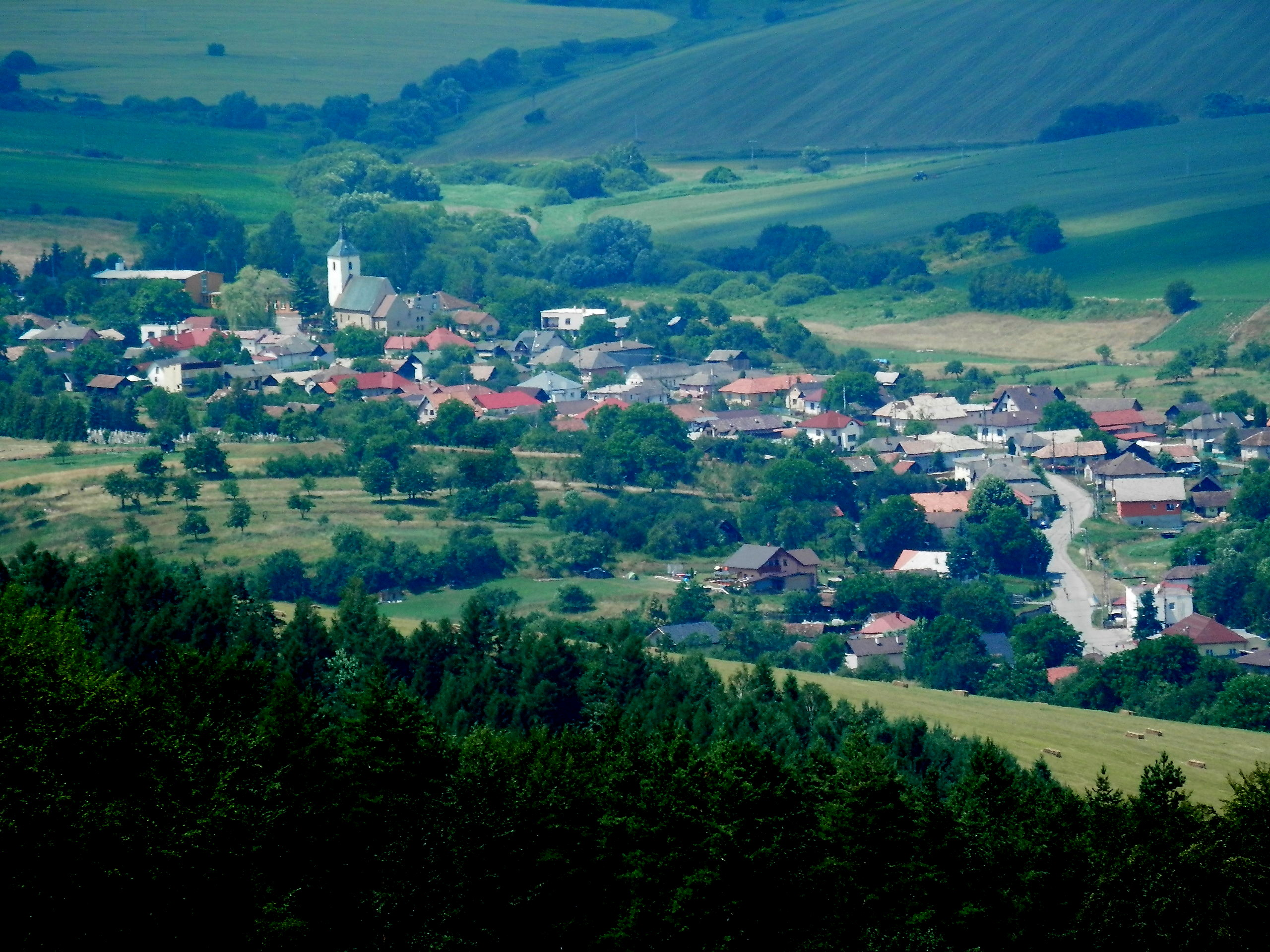 Obec Hrabkov, okres Prešov. Pohľad od Klenovského vrchu.